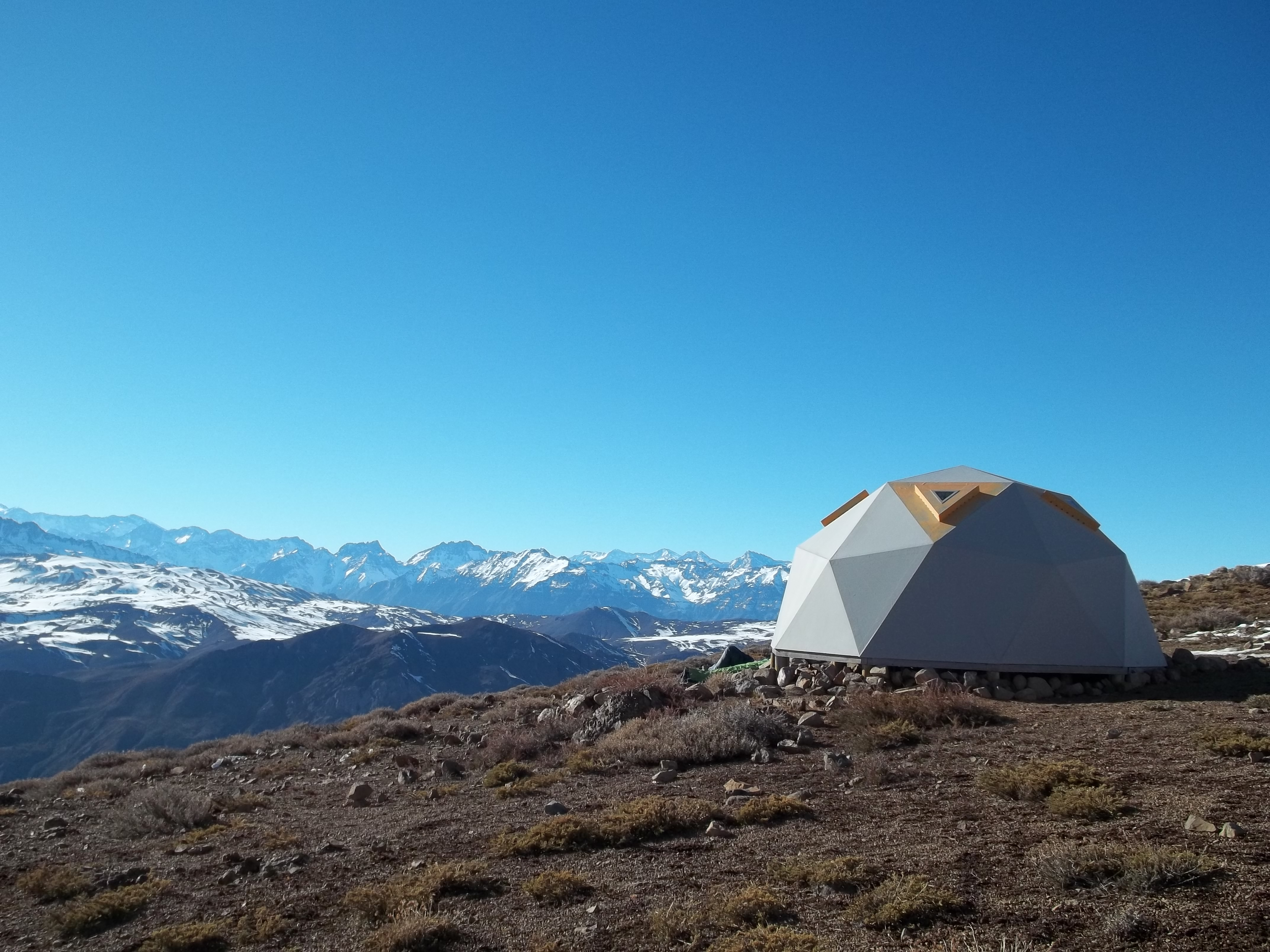 Vista del refugio en la cima del cerro Provincia, en la Región Metropolitana, Chile. Con vista hacia el oriente.